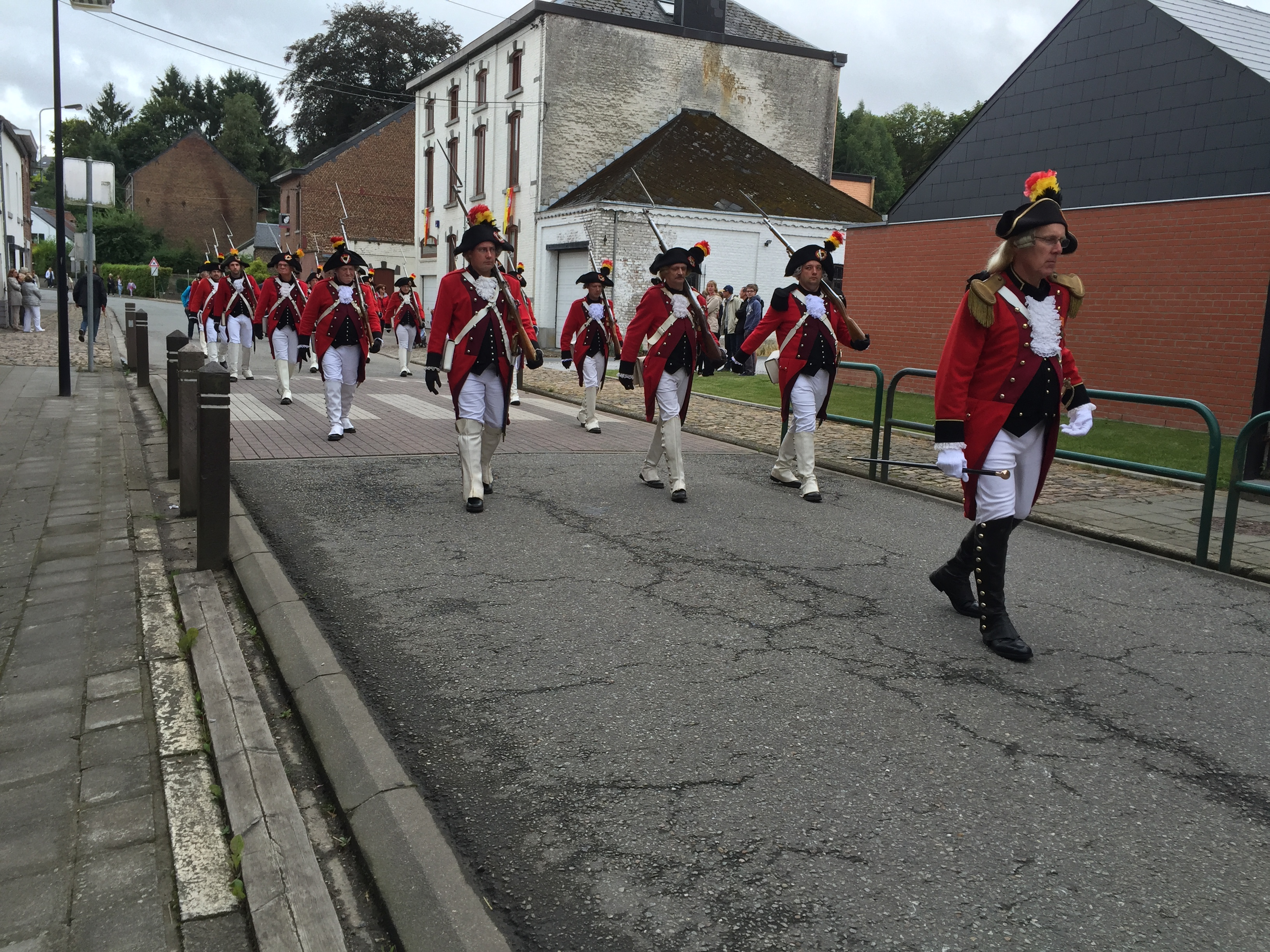 Marche Saint-Roch de Ham-sur-Heure le dimanche 21 août 2016